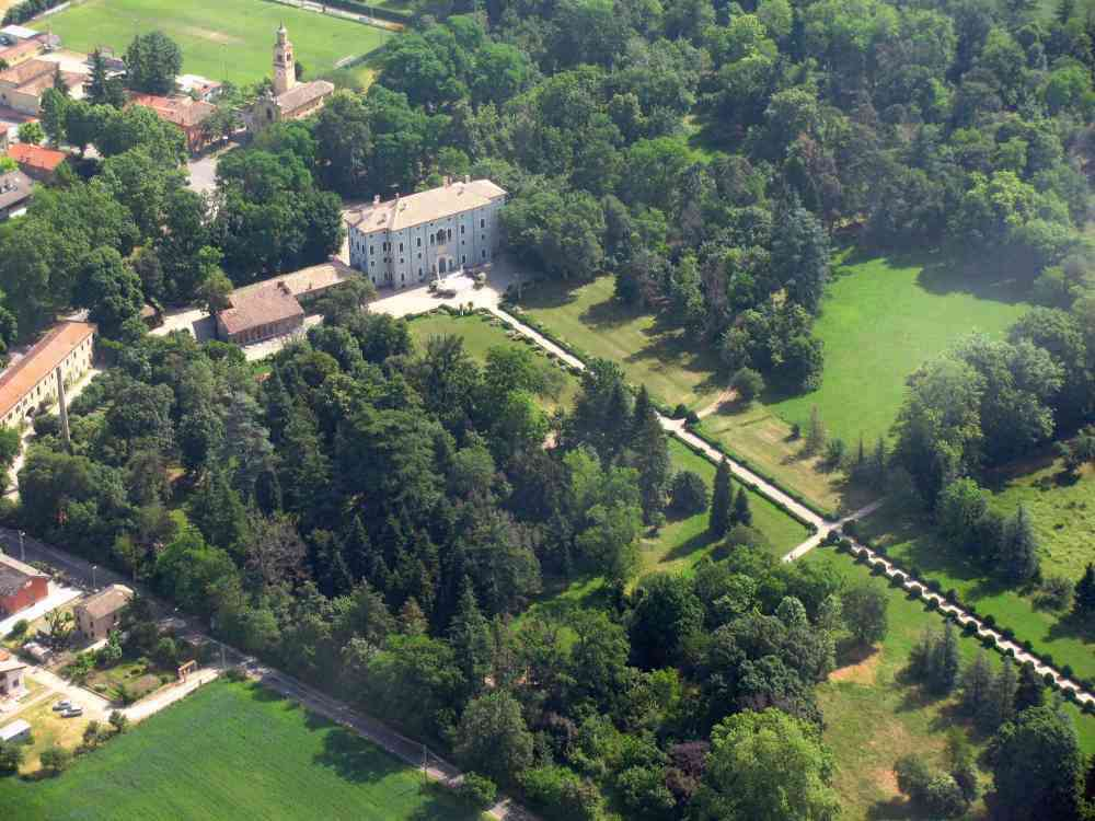 Veduta aerea del parco della villa Malenchini di Carignano (Parma).